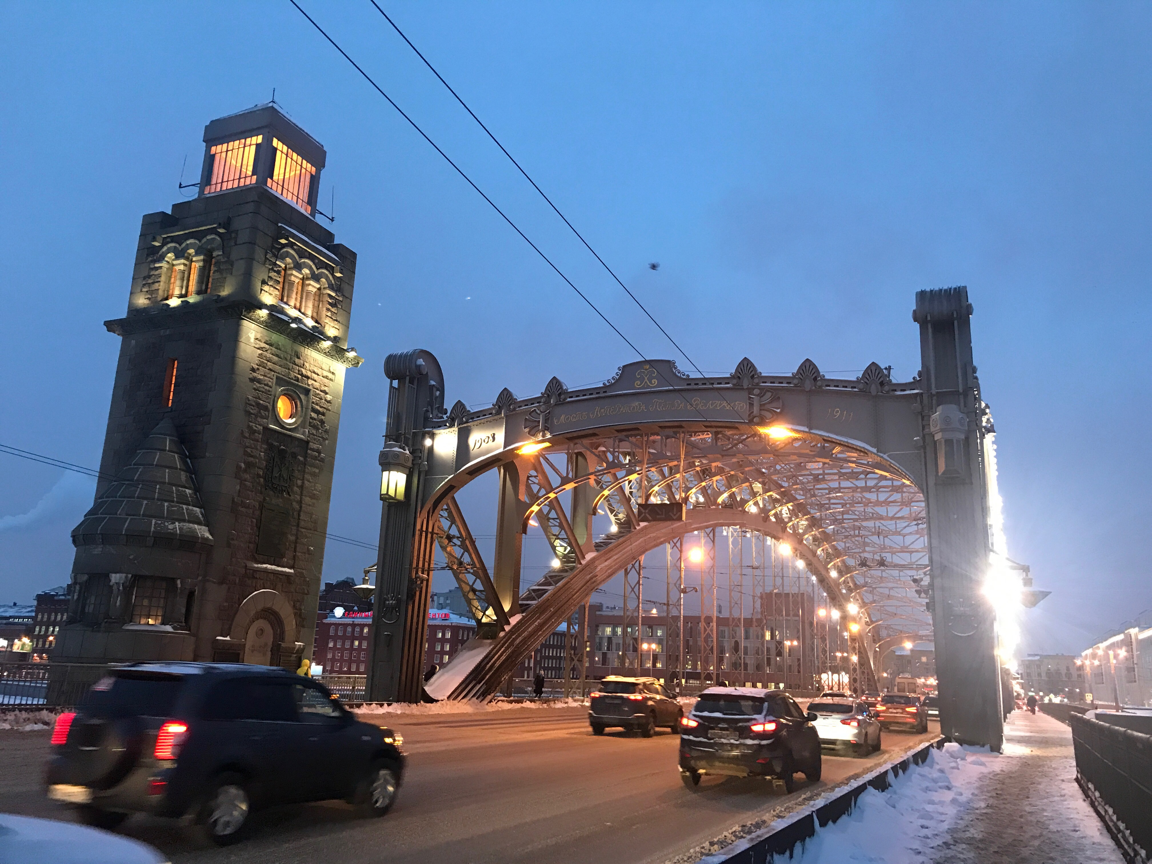 Большеохтинский мост со стороны Малой Охты